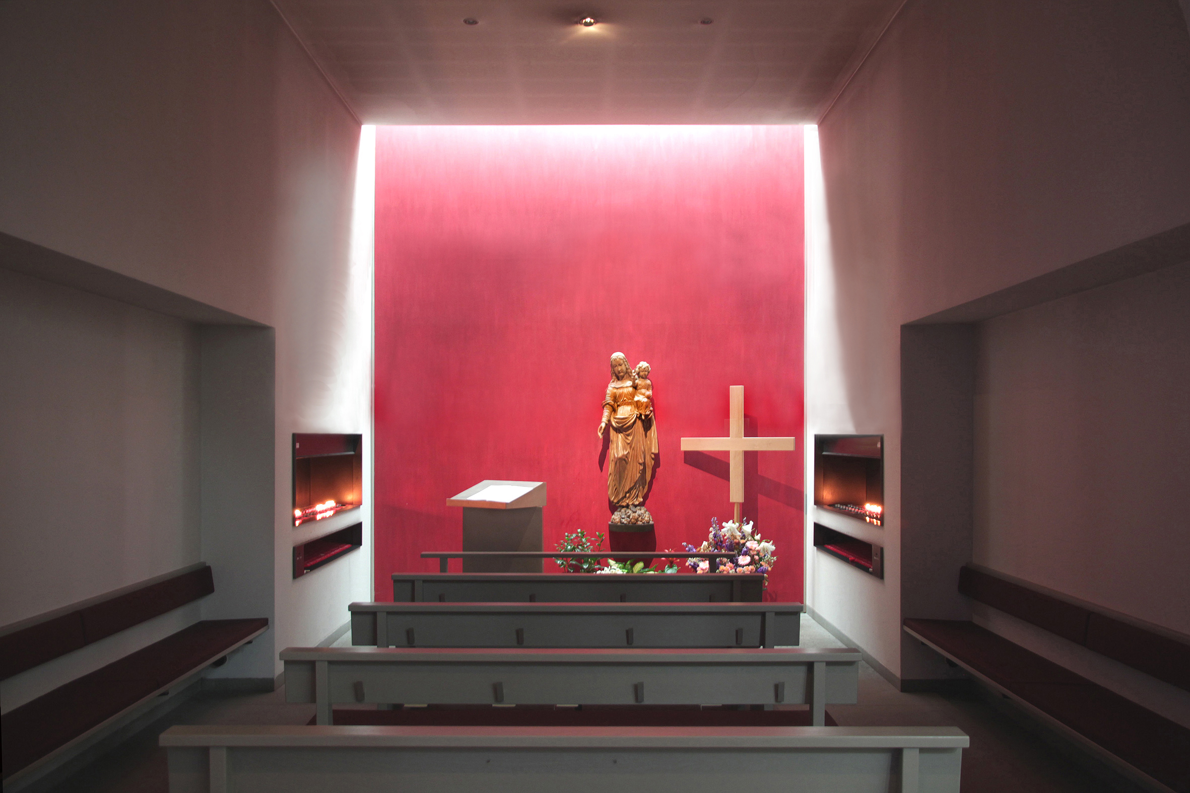 Römisch-katholische Pfarrkirche St. Franziskus Zürich-Wollishofen Marienkapelle von 2004